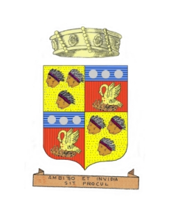 Brasao Baroes do Amparo com cor (real) baronal